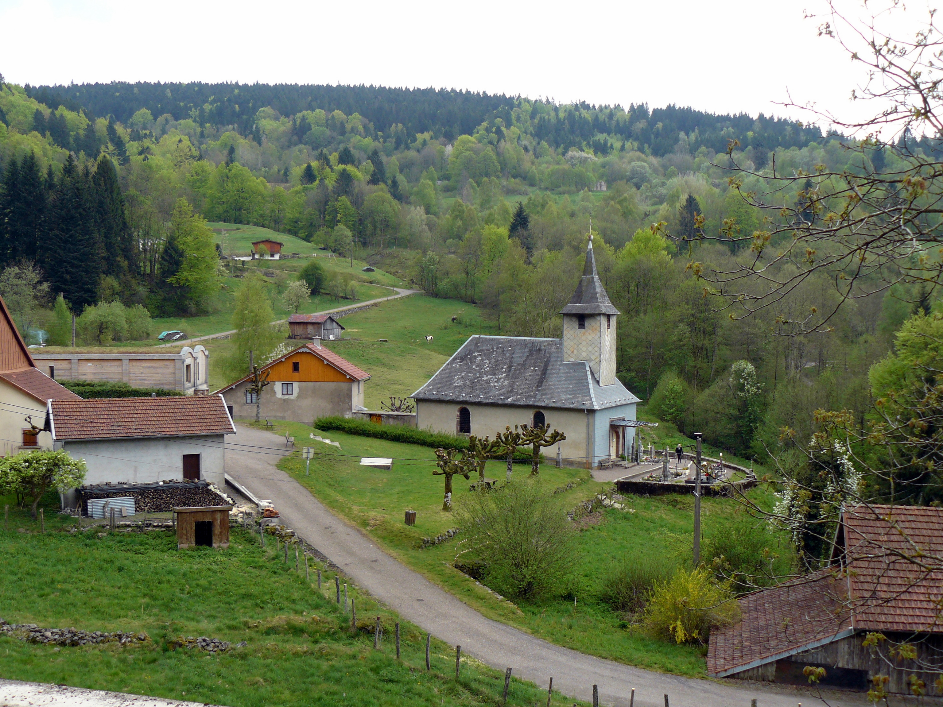 Vue de Château-Lambert (commune de Haut-du-Them-Château-Lambert, Haute-Saône, France)